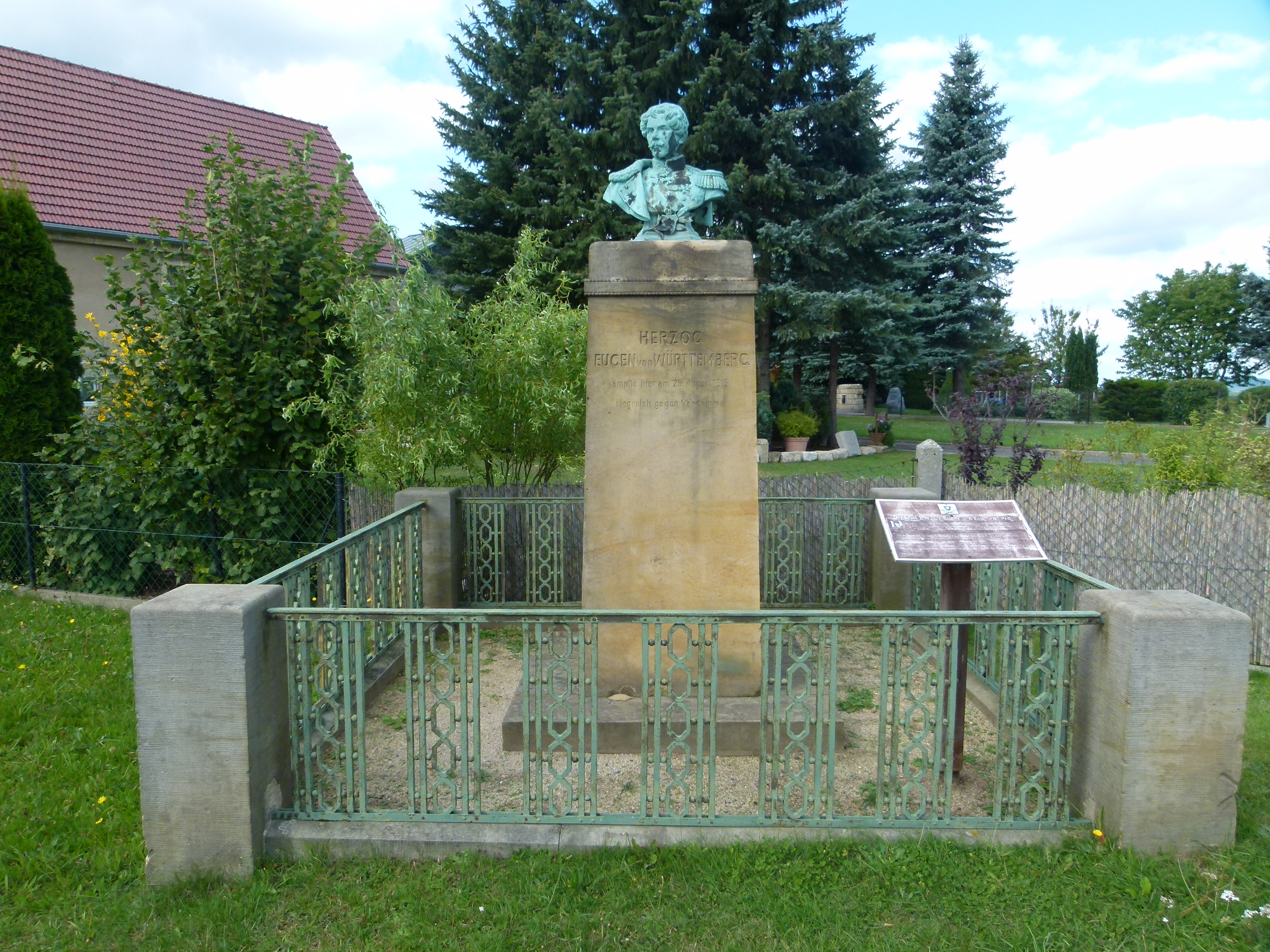 Herzog Eugen-von-Württemberg-Denkmal, Krietschwitz, Pirna, Sachsen